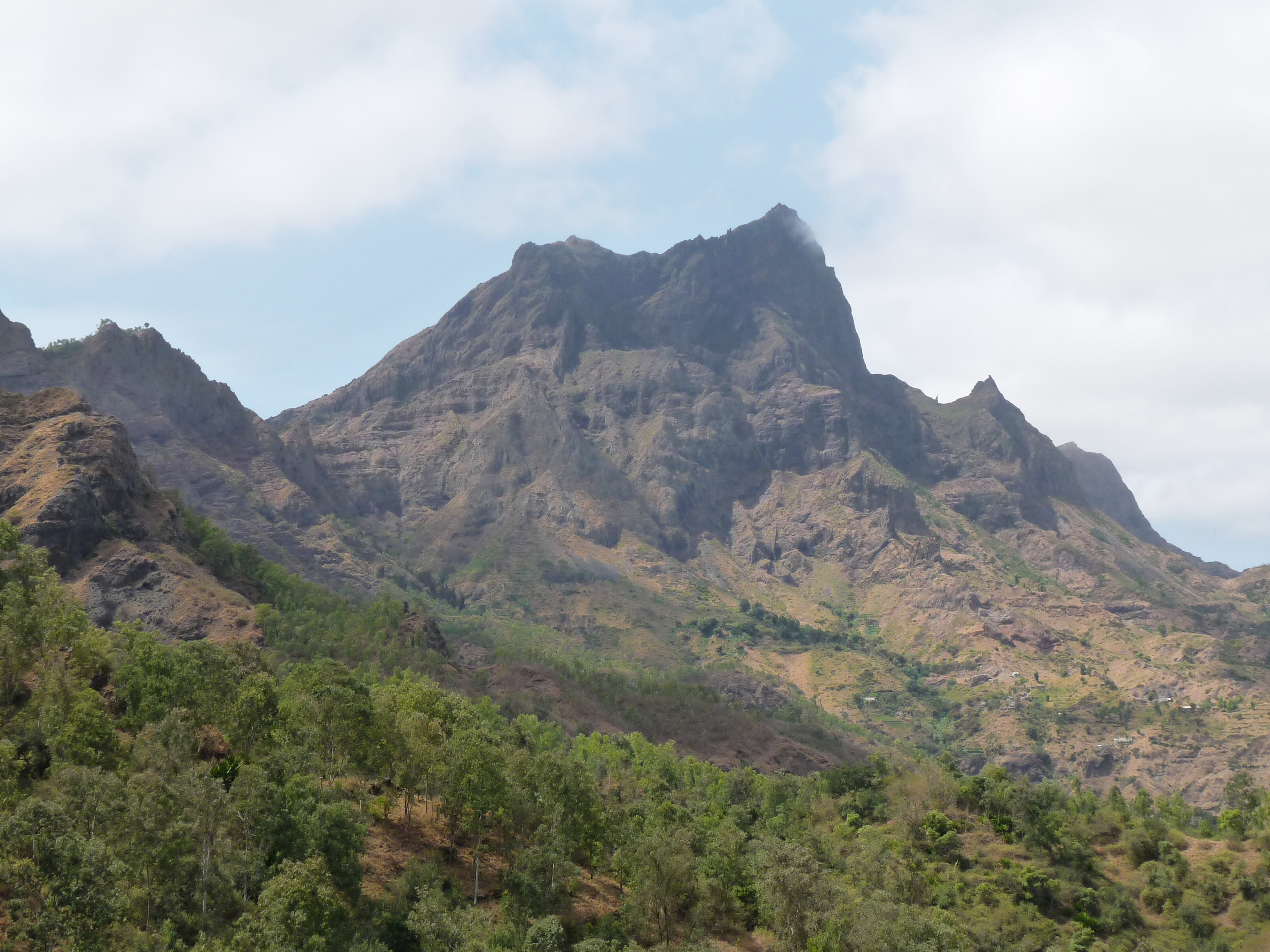 Sommet du Pico da Antónia (île de Santiago, Cap-Vert)